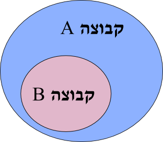 תרשים: תת קבוצה